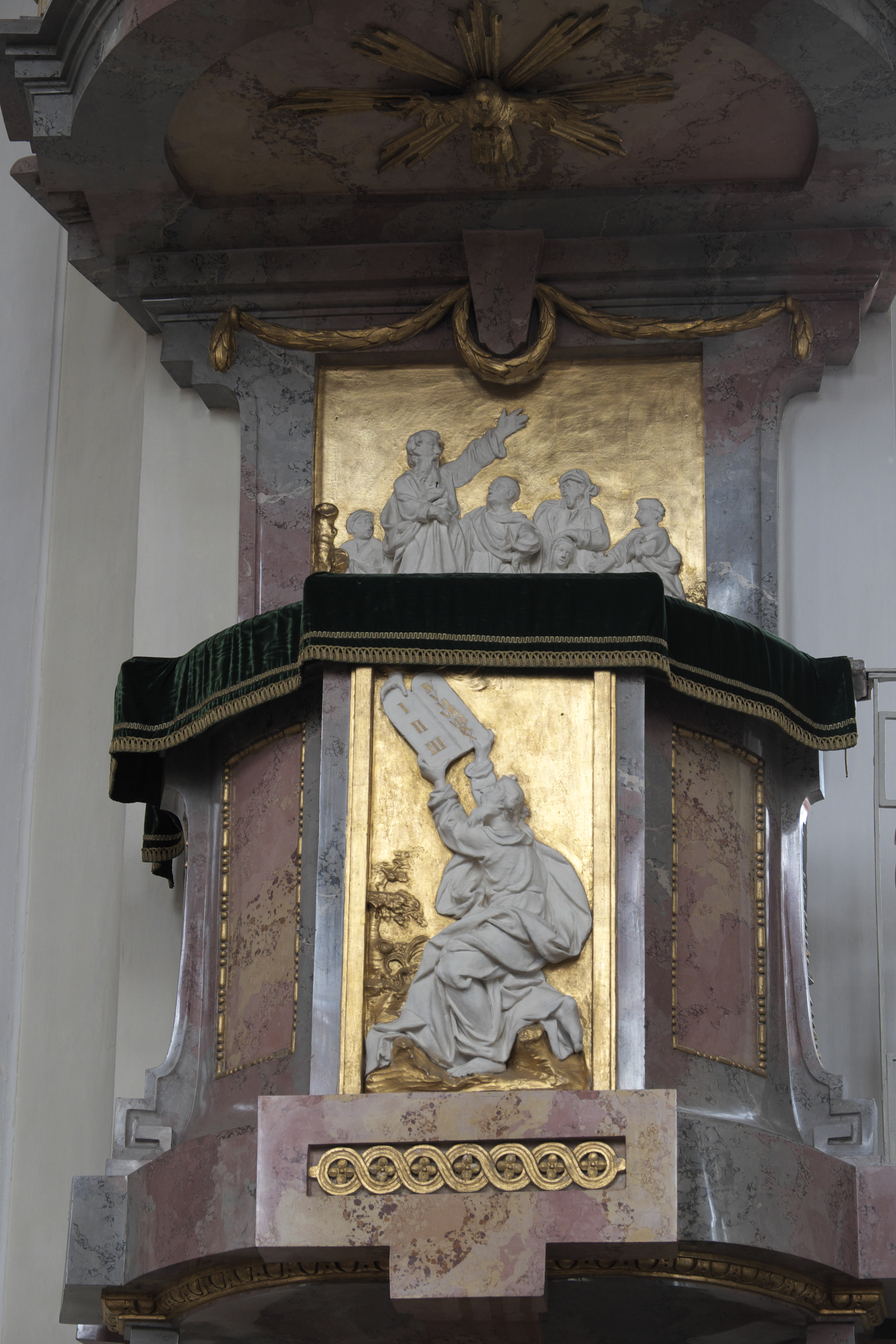 Katholische Pfarrkirche St. Johannes Baptist in Dischingen (Landkreis Heidenheim/Baden-Württemberg), frühklassizistische Kanzel von Thomas Schaidhauf, Relief am Kanzelkorb, Darstellung: Moses empfängt die Gesetztestafeln